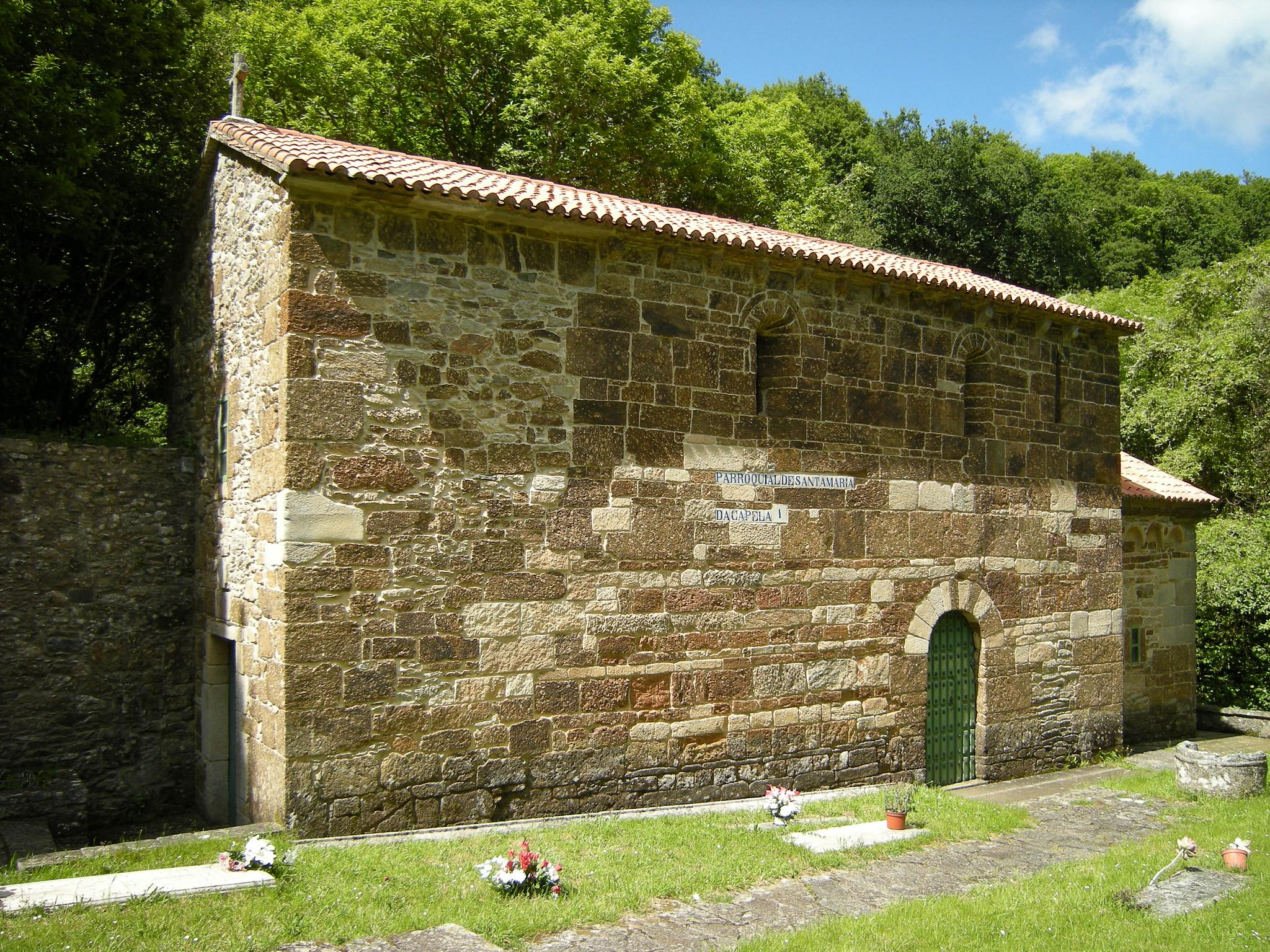 gl: Igrexa prerrománica de Santo Antolín de Toques